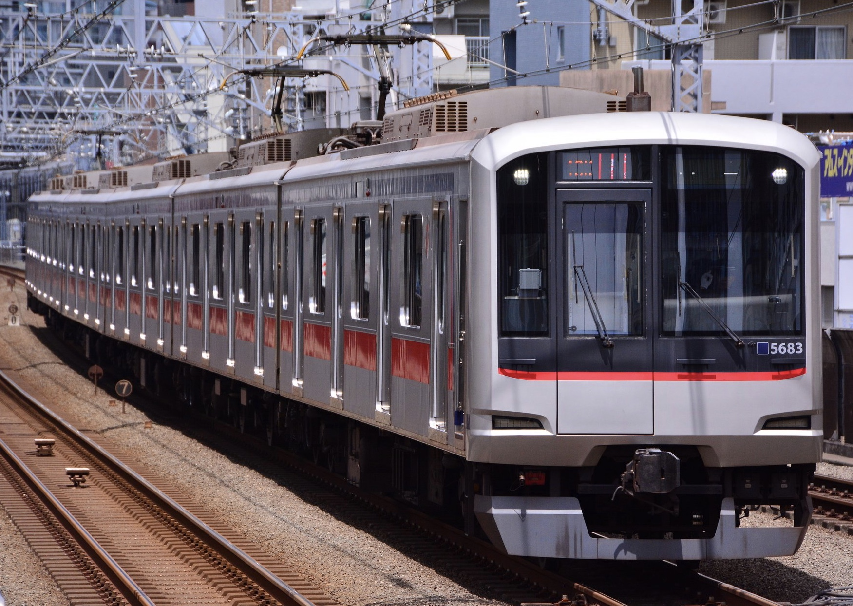 東急5080系5183編成 東急目黒線武蔵小杉駅